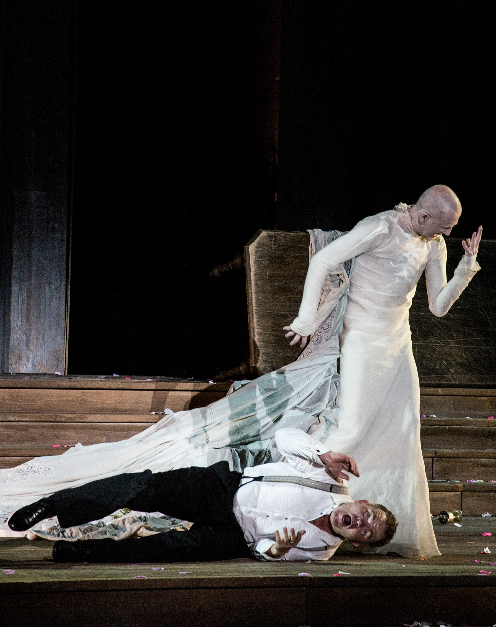 Szene aus Jedermann Inszenierung von Brian Mertes und Julian Crouch. Salzburger Festspiele 2014. Jedermann: Cornelius Obonya, Tod: Peter Lohmeyer.